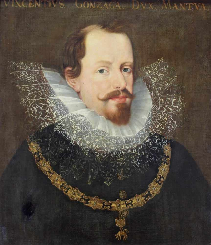 Portrait of Vincenzo I Gonzaga